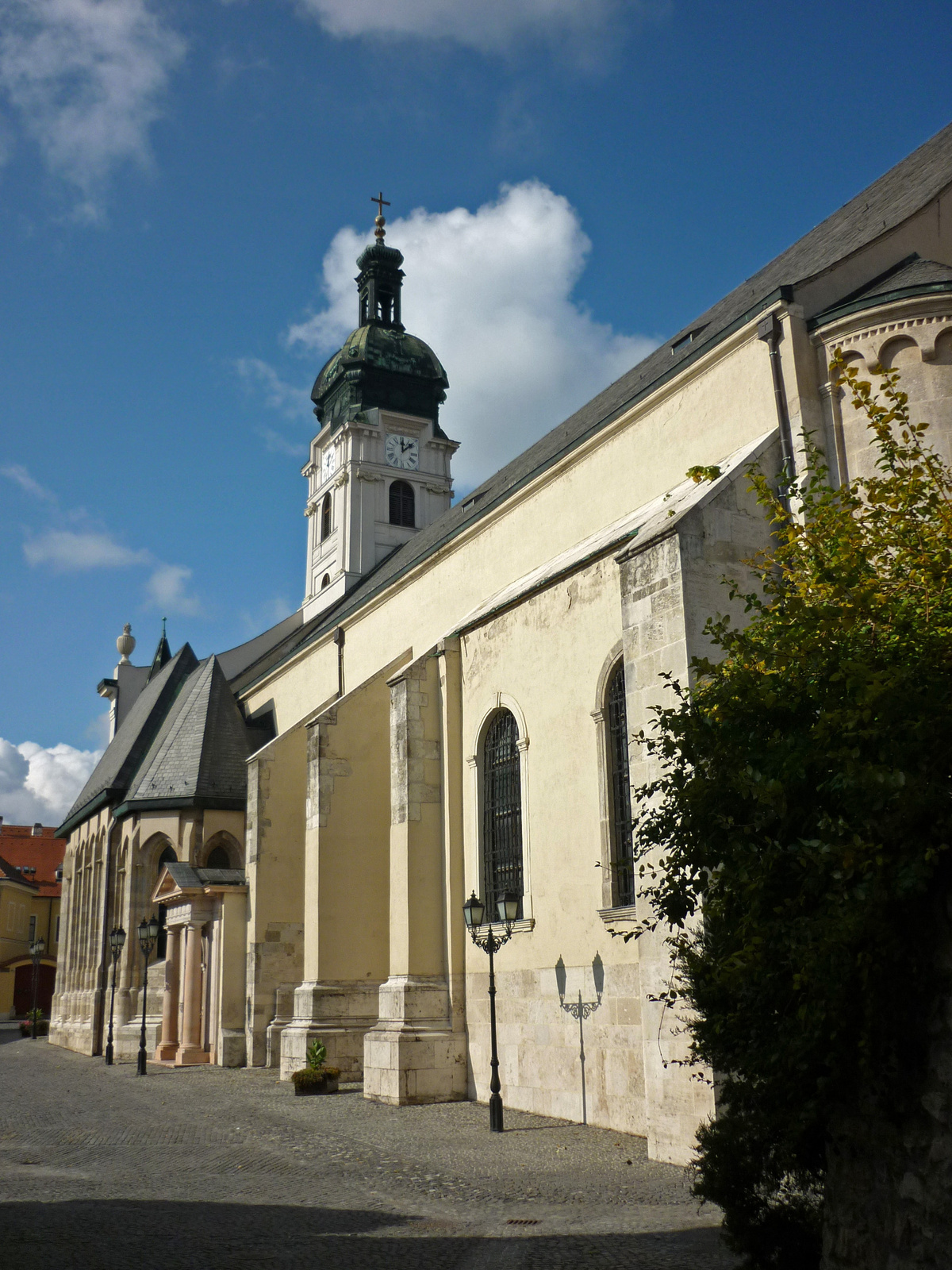 Püspöki Székesegyház (Győr, Apor Vilmos tér, Káptalandomb) This is a photo of a monument in Hungary, Identifier: 4180